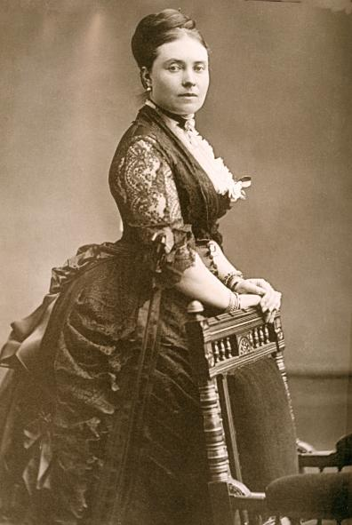 Photographie de Victoria, impératrice d'Allemagne